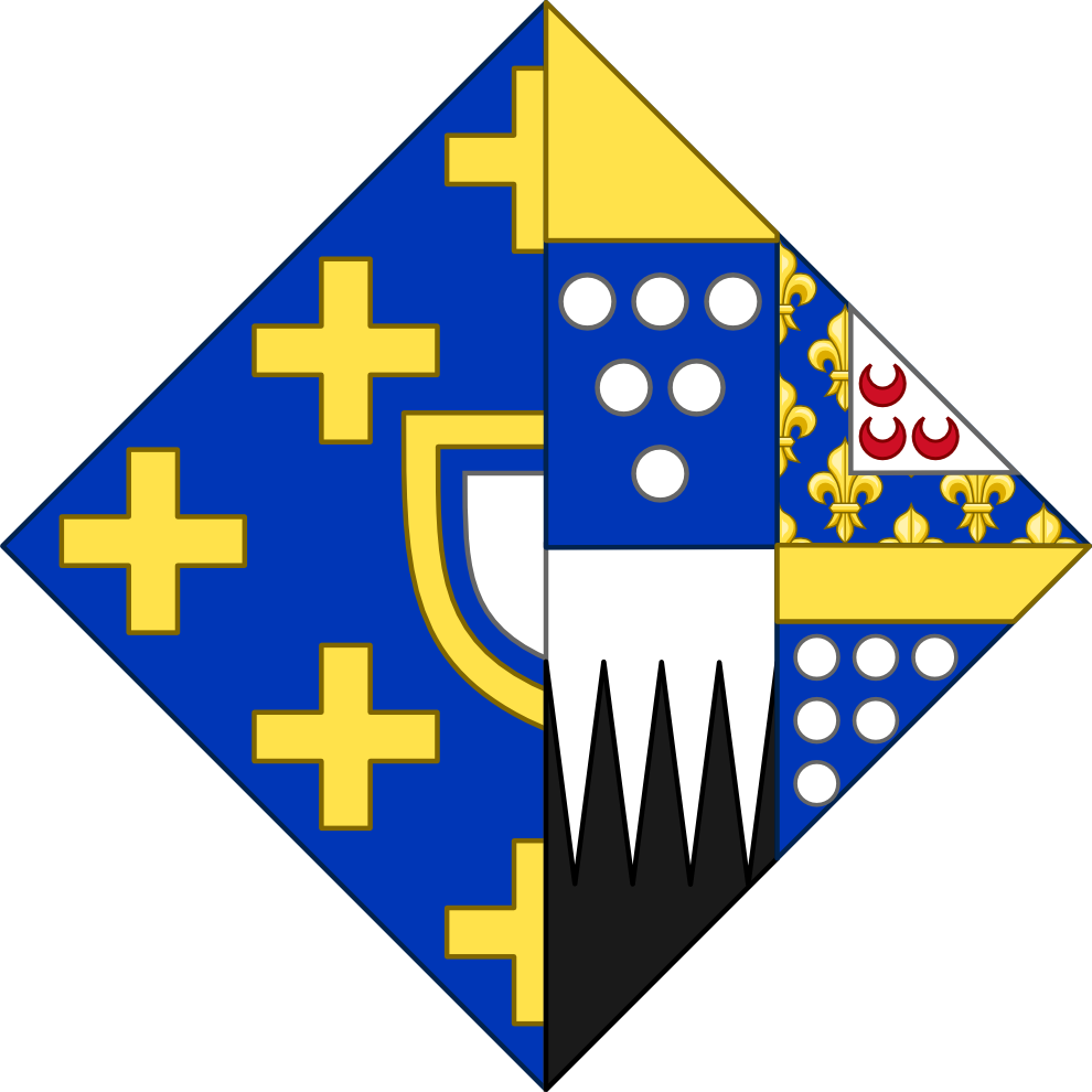 Armoiries de Diane de Poitiers, duchesse de Valentinois